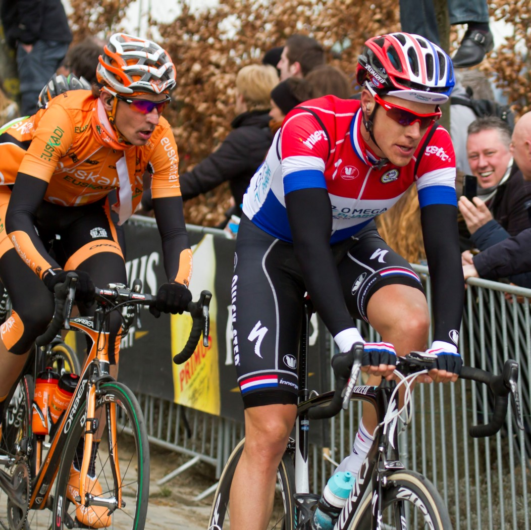 211 terpstra